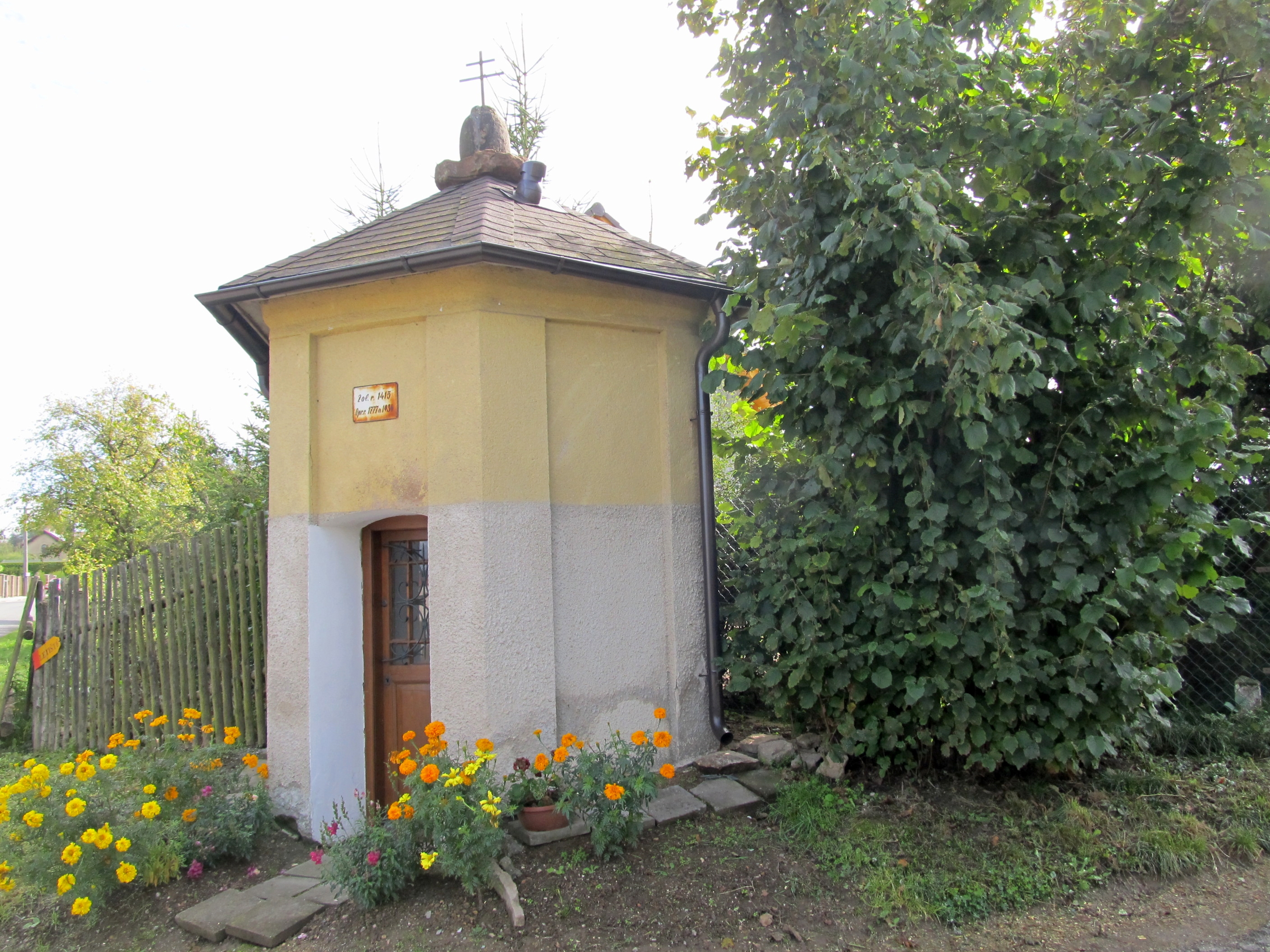 Kaple P. Marie (Kramolna), u hlavní silnice, proti čp. 63, Kramolna